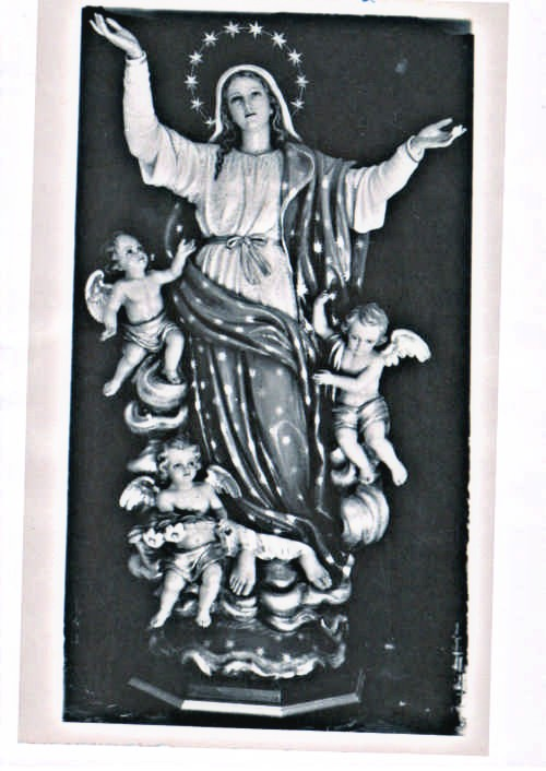 Prima foto scattata al simulacro dell'Assunta appena arrivato a Nizza da Ortisei, 1954. Collezione di Don Roberto Romeo.